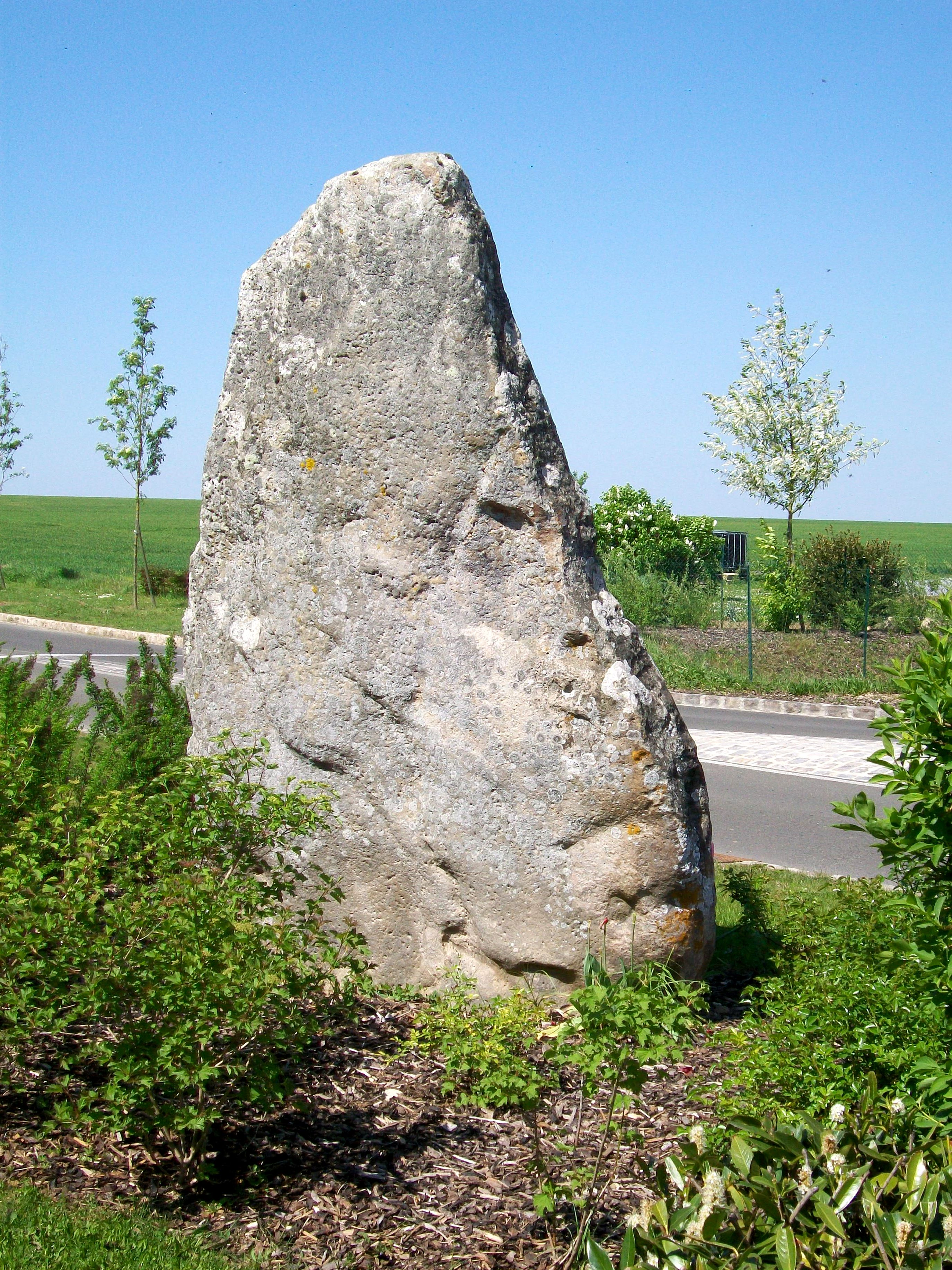 Borest (Oise) ; le menhir dit la Queuse de Gargantua, à l'entrée du village sur la D 330a. Il est classé Monuments historiques depuis le 7 octobre 1944.